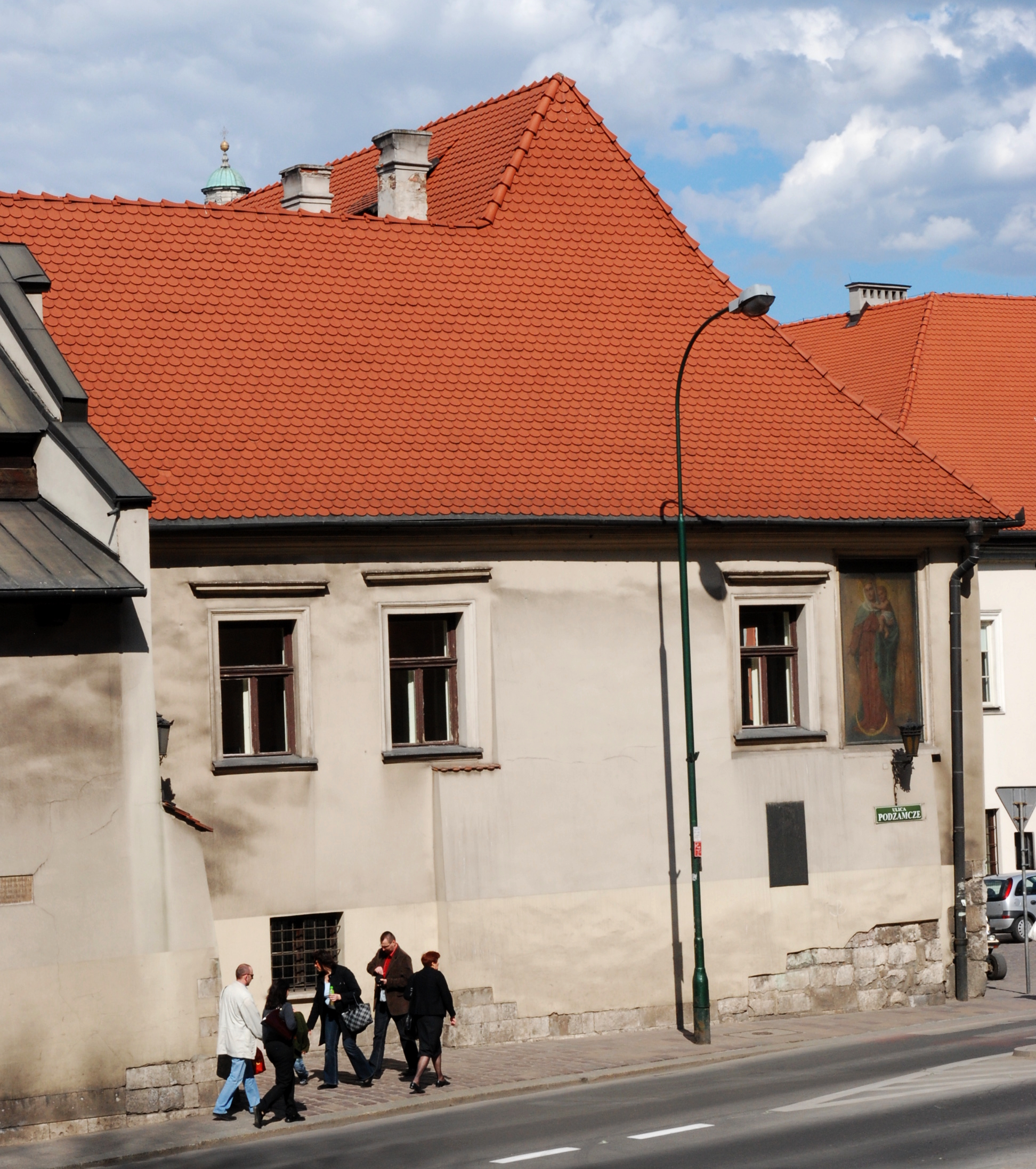 Dom Jana Długosza, od ul. Podzamcze, Kraków.